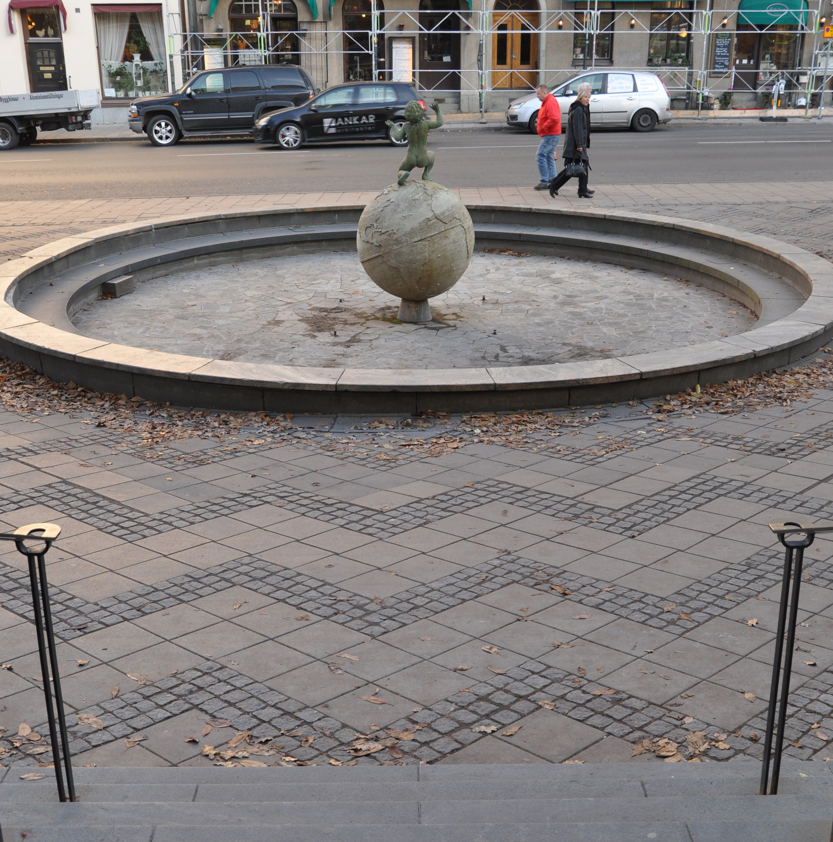 Eastmanfontänen av Clarence Blum. Rest 1936.